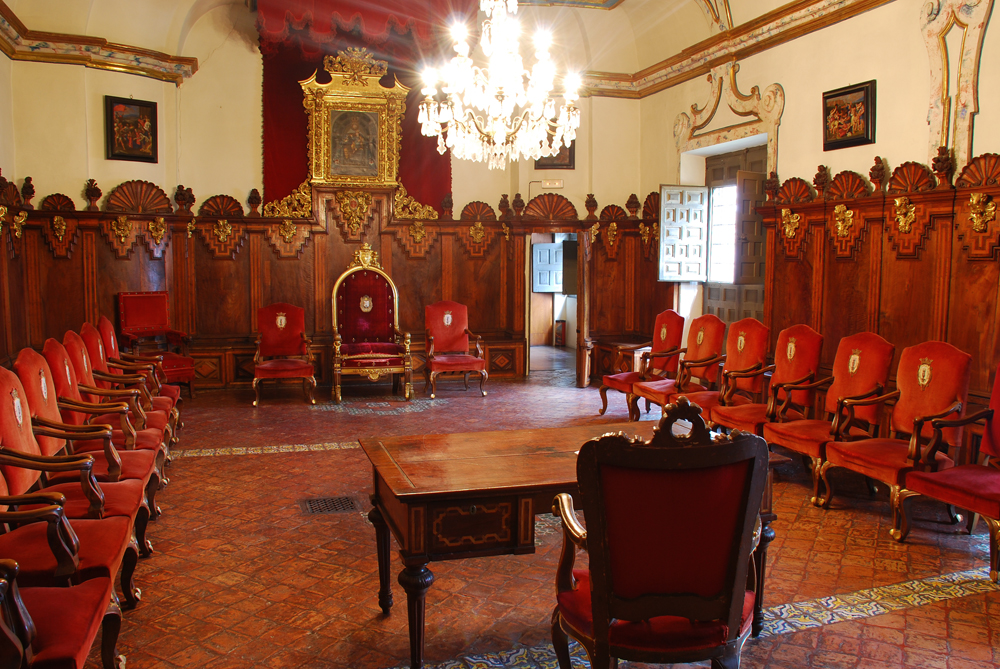 Sala capitular de la catedral de Pamplona